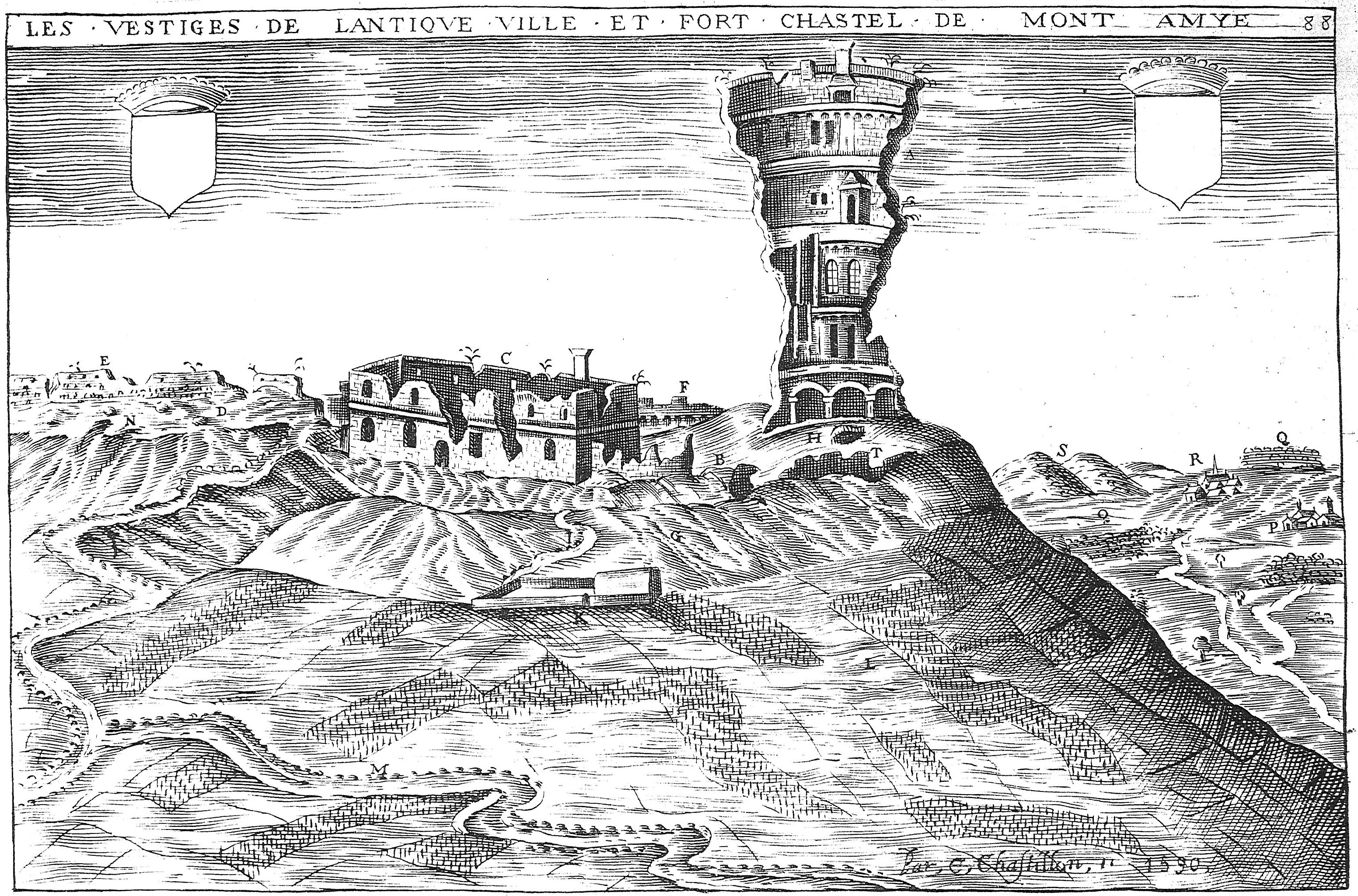 vue de : Cf titre.